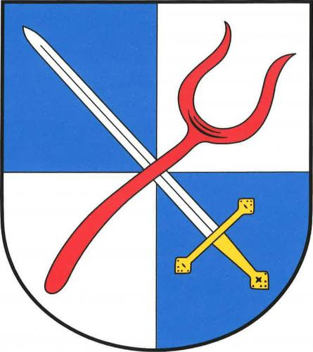 znak, Božejov, okres Pelhřimov